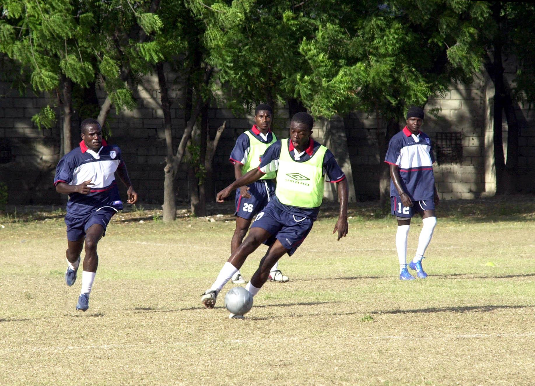 Porto-Príncipe, Haiti - Treino da seleção do Haiti, que enfrentará a seleção brasileira no dia 18/08.